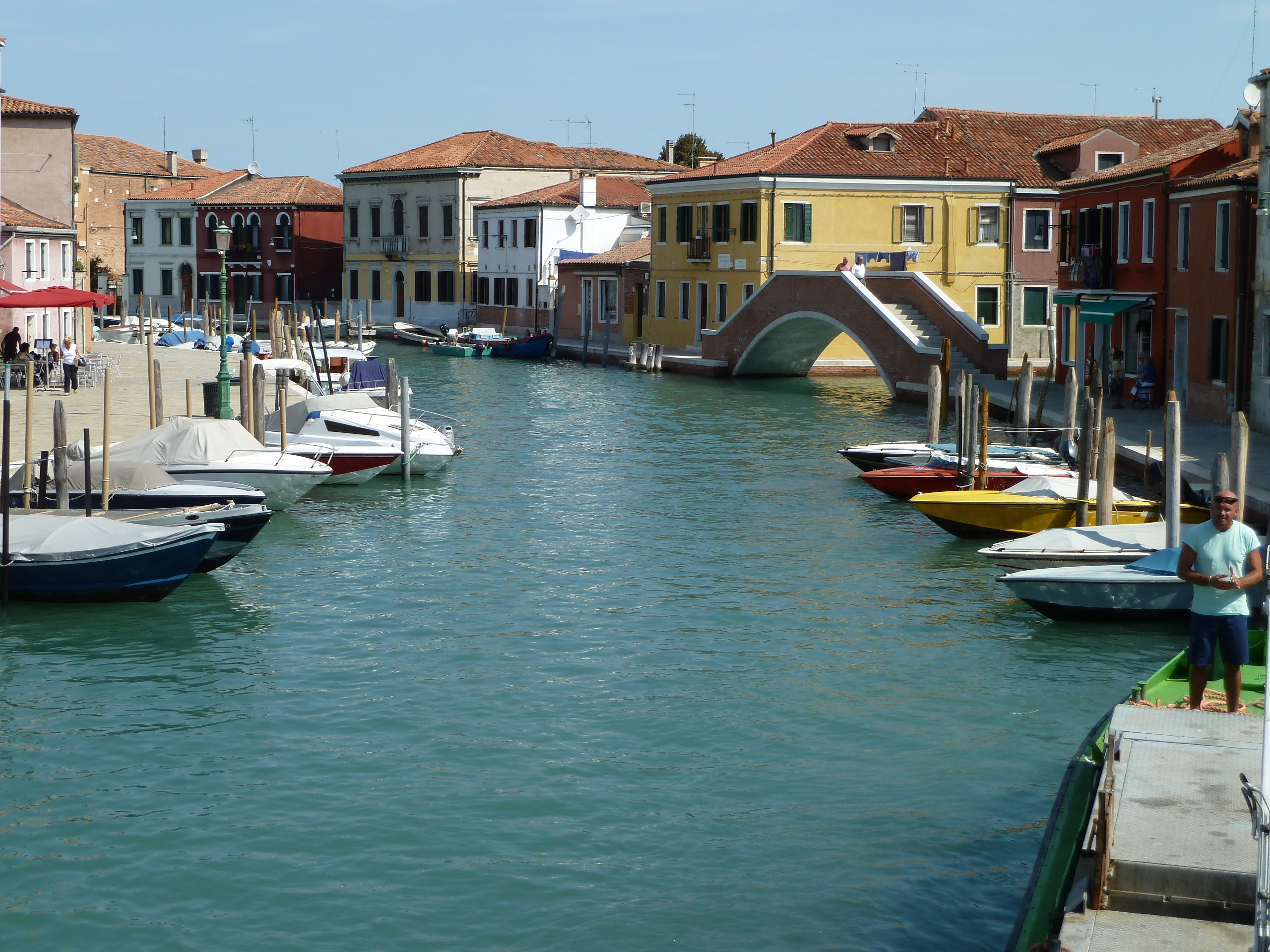 Ponte di San Martino Murano